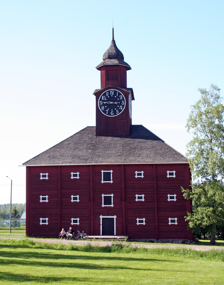 Jokioisten tapulimakasiini